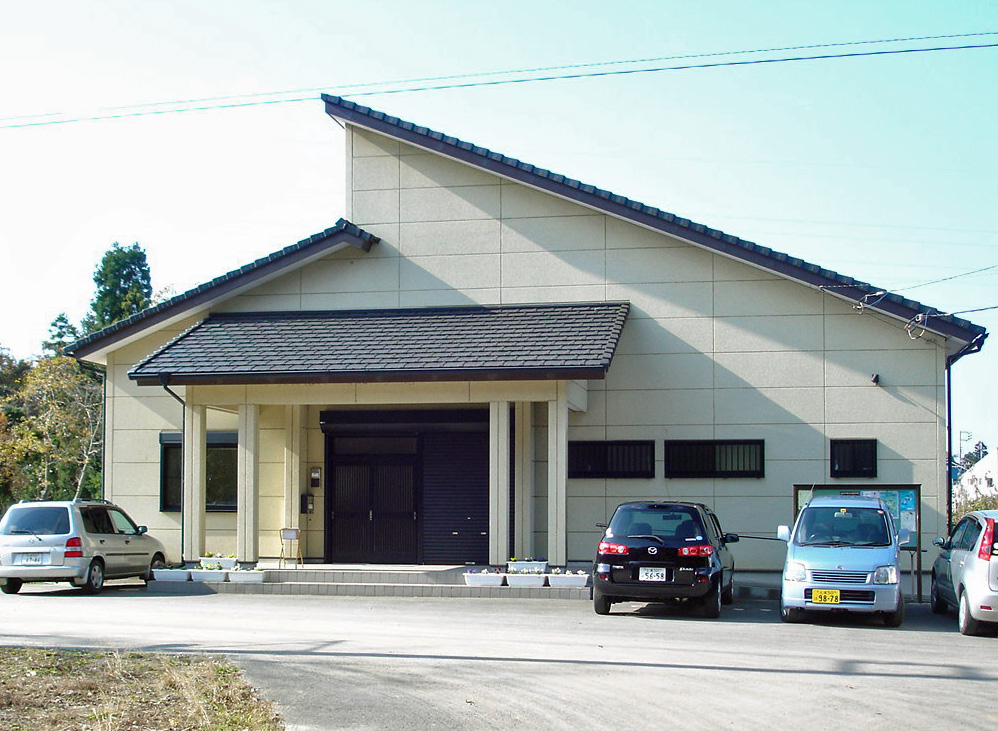 向台自治会館